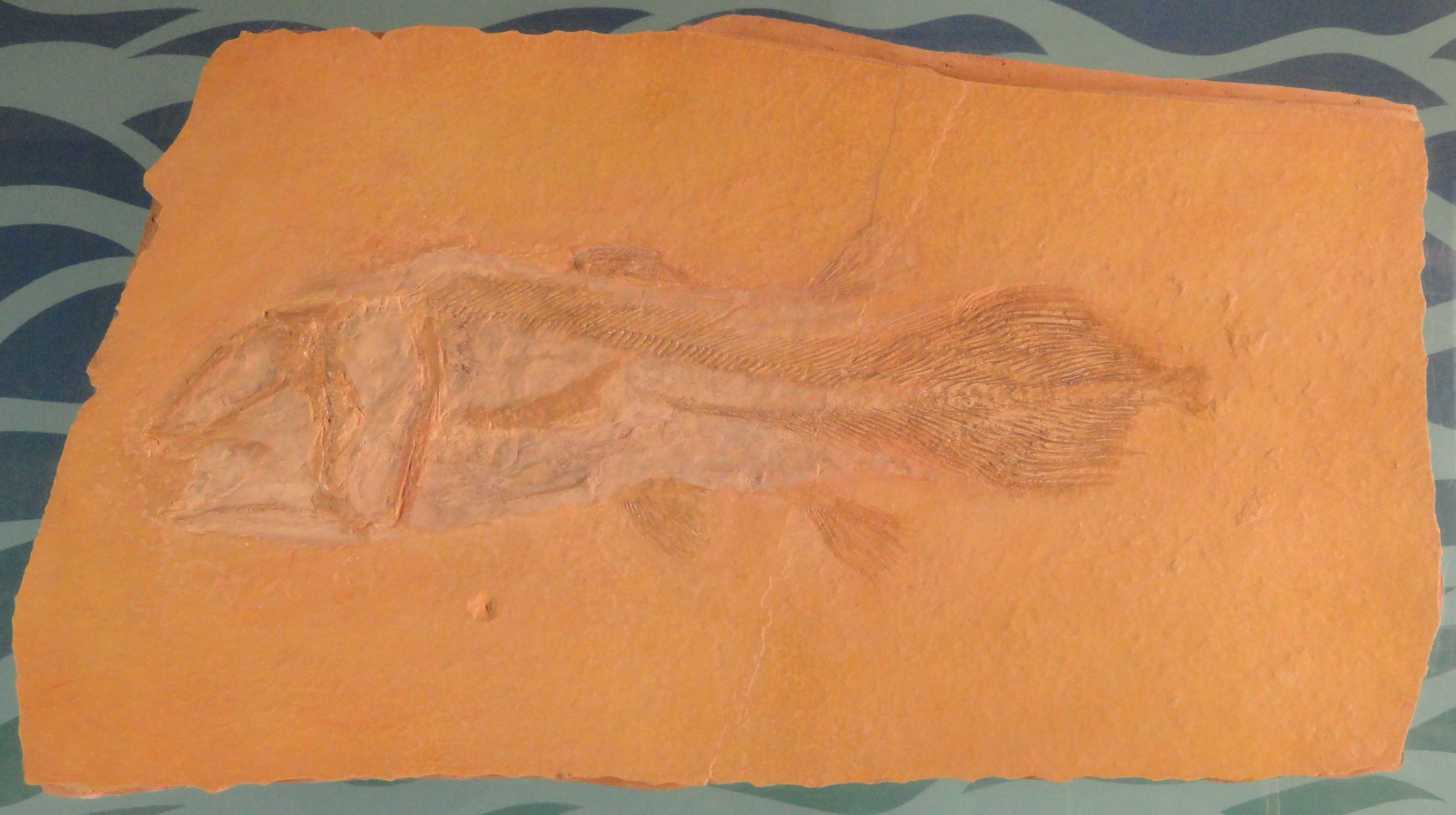 Exhibit in Naturmuseum Senckenberg, Frankfurt am Main, Germany.